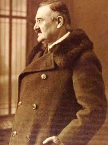 Anton Gnirs (1873-1933), český, německy hovořící hostorik, archeolog a učitel.